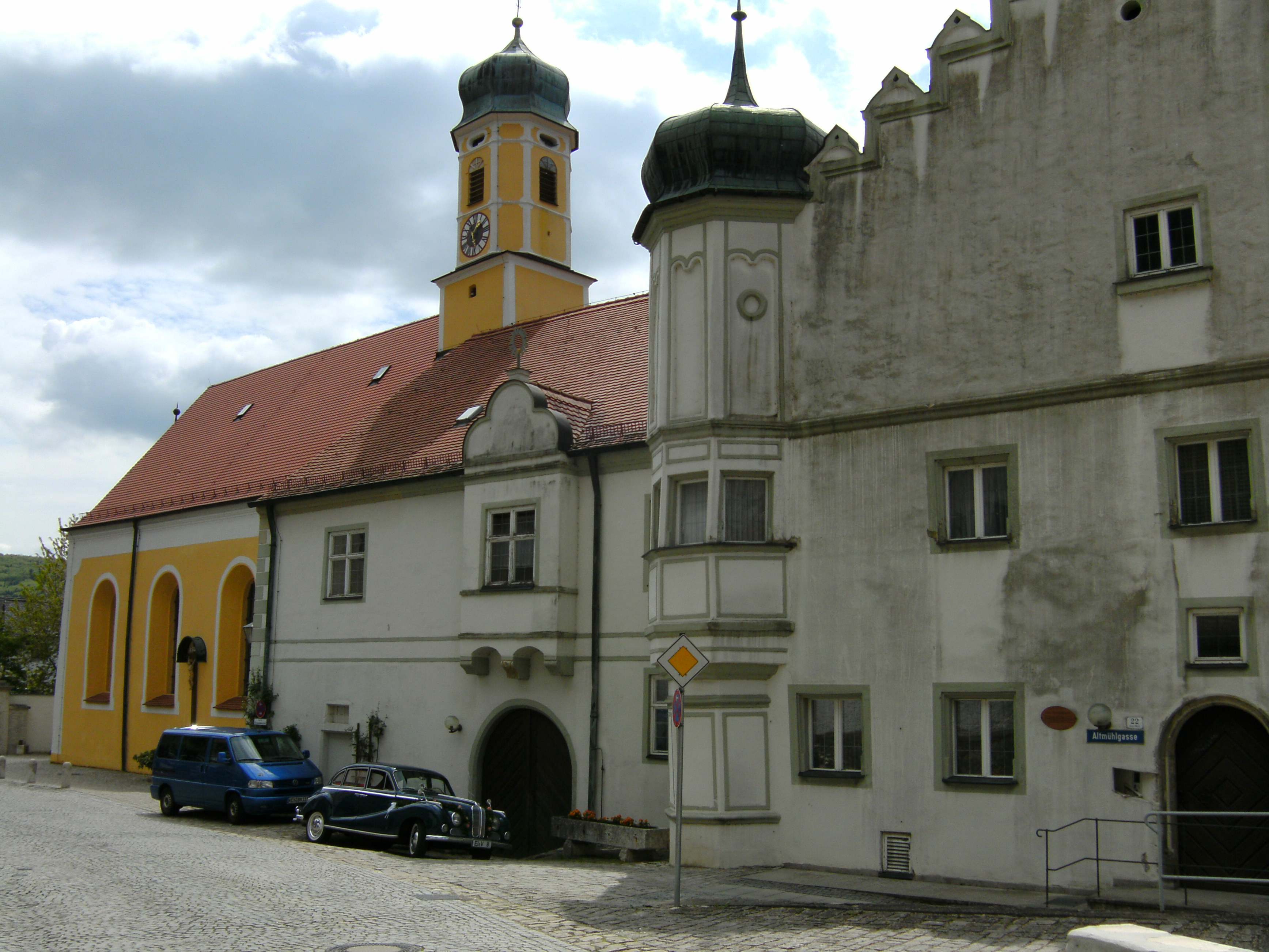 Ehemaliges Kollegiatstift Neuessing im Altmühltal, Landkreis Kelheim, Bayern